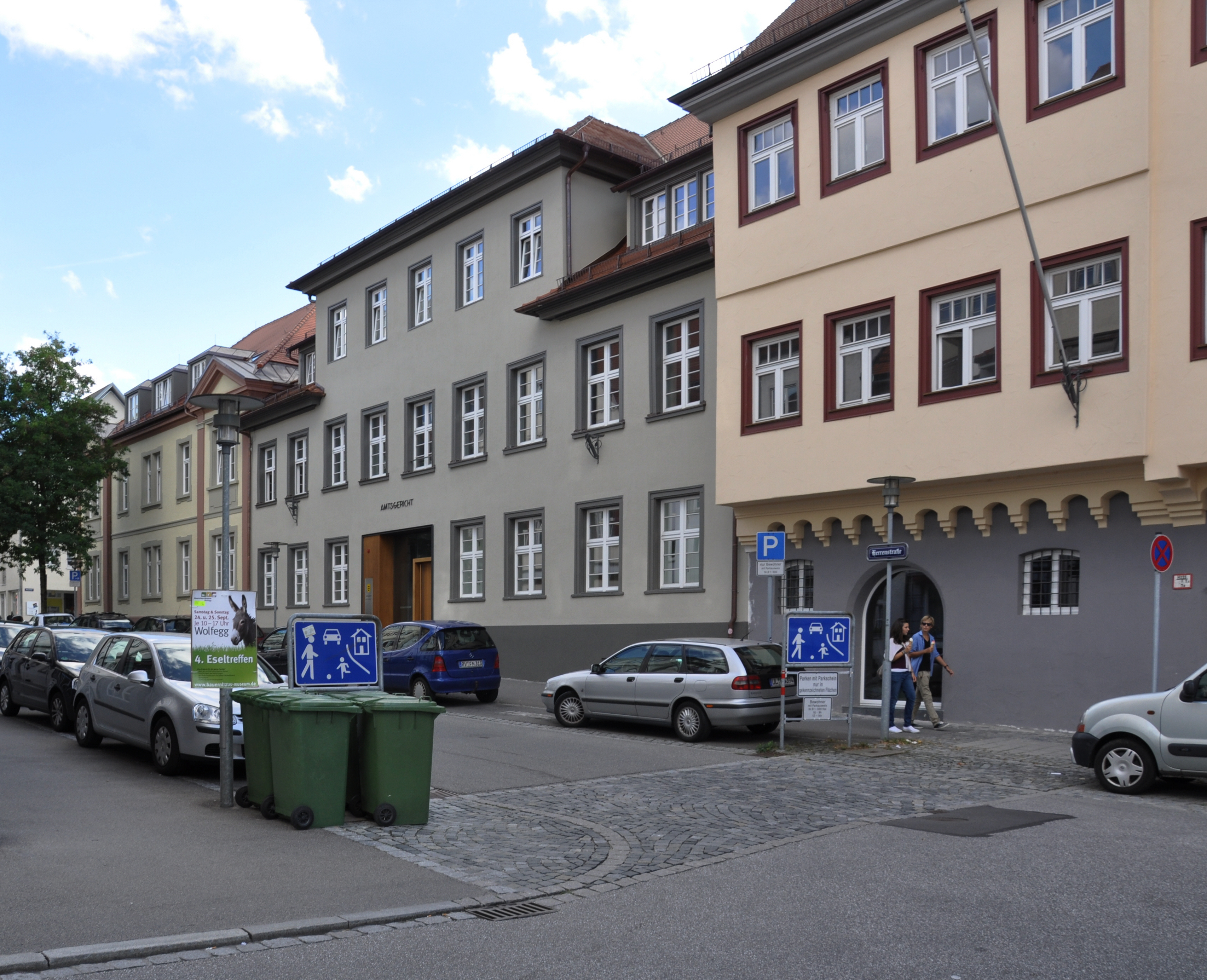 Ravensburg, Amtsgericht Ravensburg, Häuser Herrenstraße 40 (rechts), 42 (Mitte) und 44 (links)